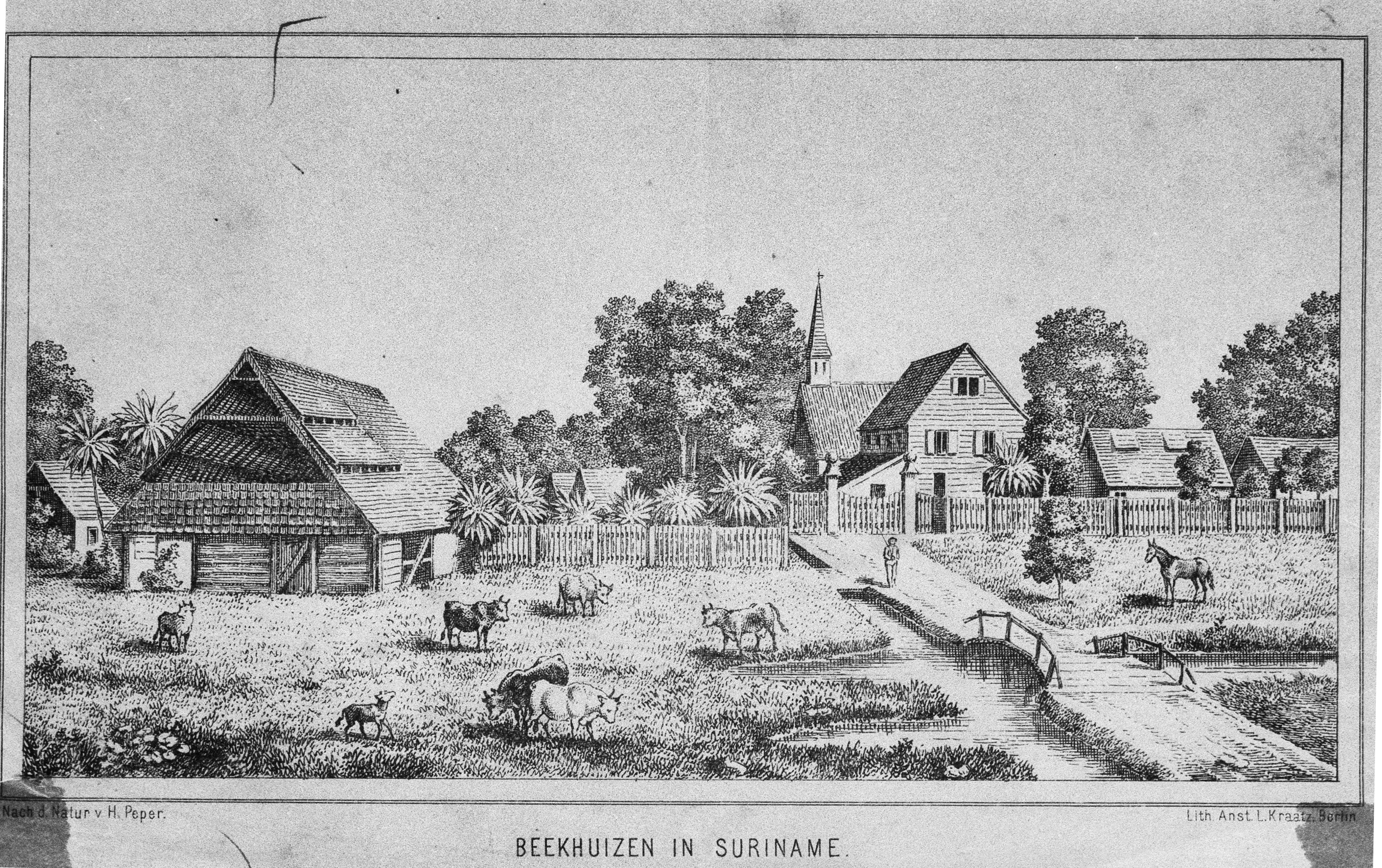 Lithografie van Leopold Kraatz, Berlin, ongedateerd van de plantage Beekhuizen in Suriname. De tekenaar was de zendeling-onderwijzer Heinrich Peper (opmerking: Reproductie uit archief van de Evangelische Broedergemeente Suriname te Paramaribo).